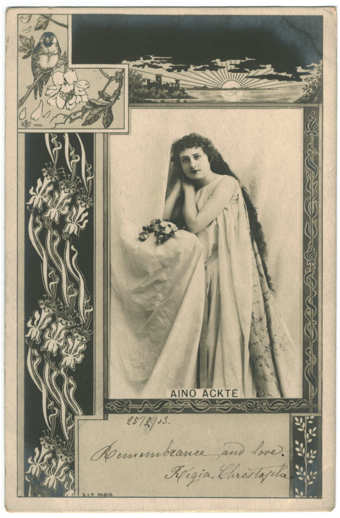 ACKTÉ, Aïno_SIP. Photo Reutlinger